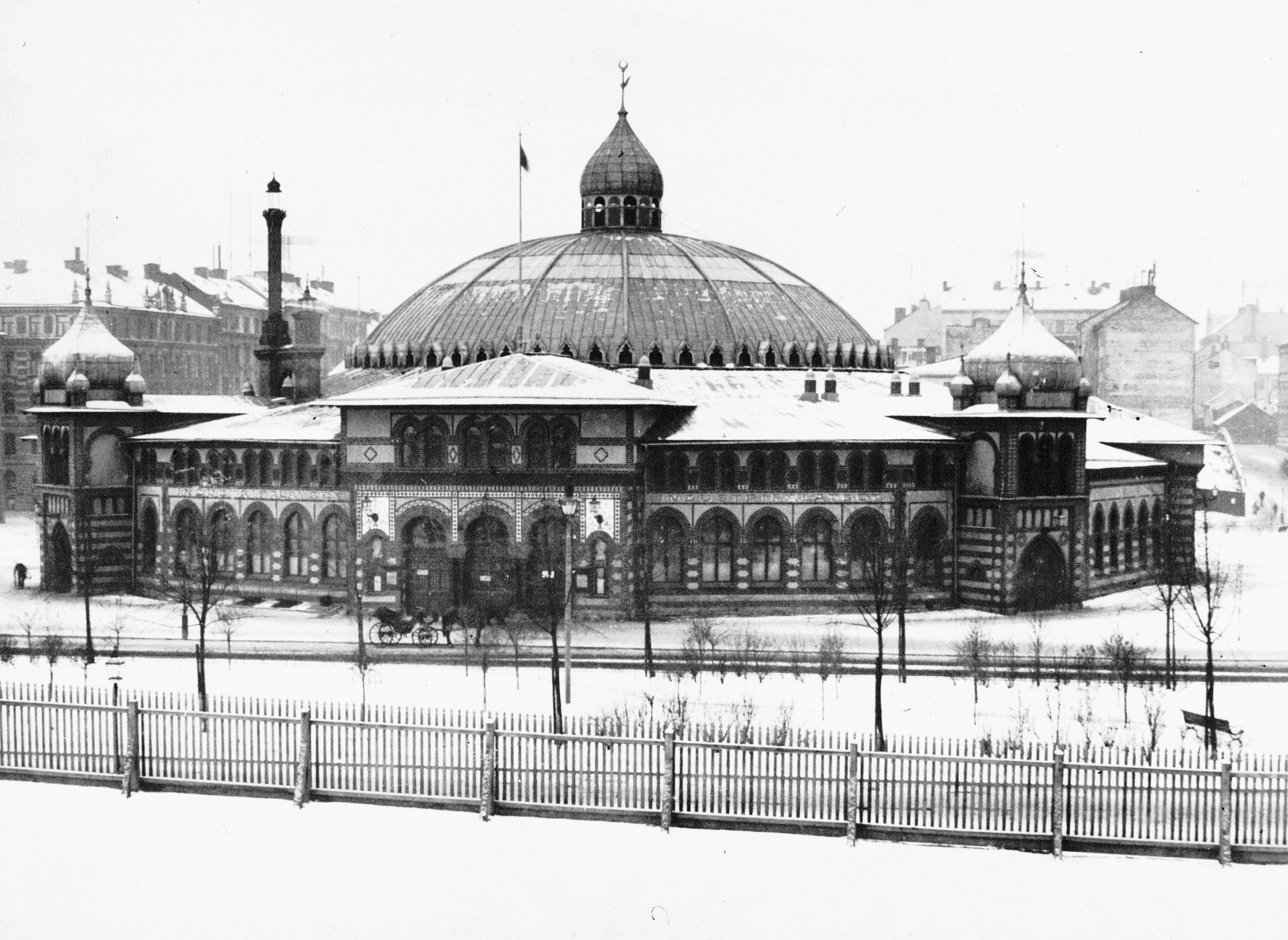 Industripalatset